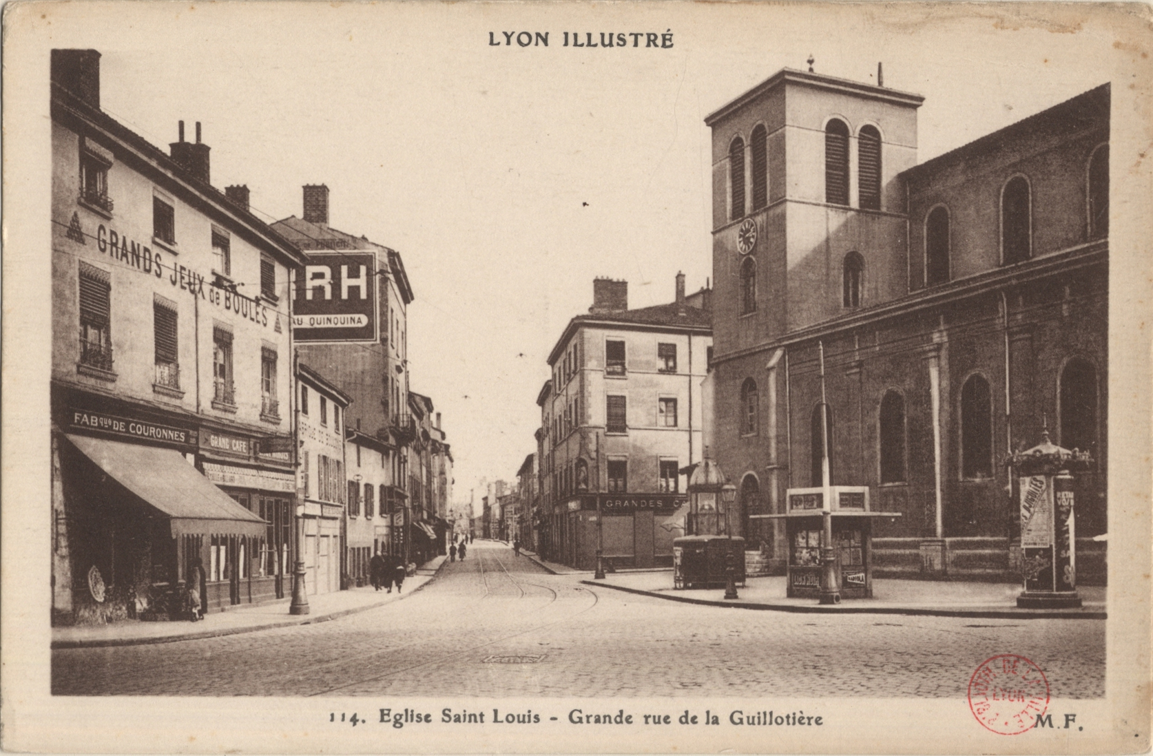 Claude, empereur romain représenté de profil regard à gauche, coiffé d'une couronne de laurier, vêtu d'une armure, appuyé sur un bâton.